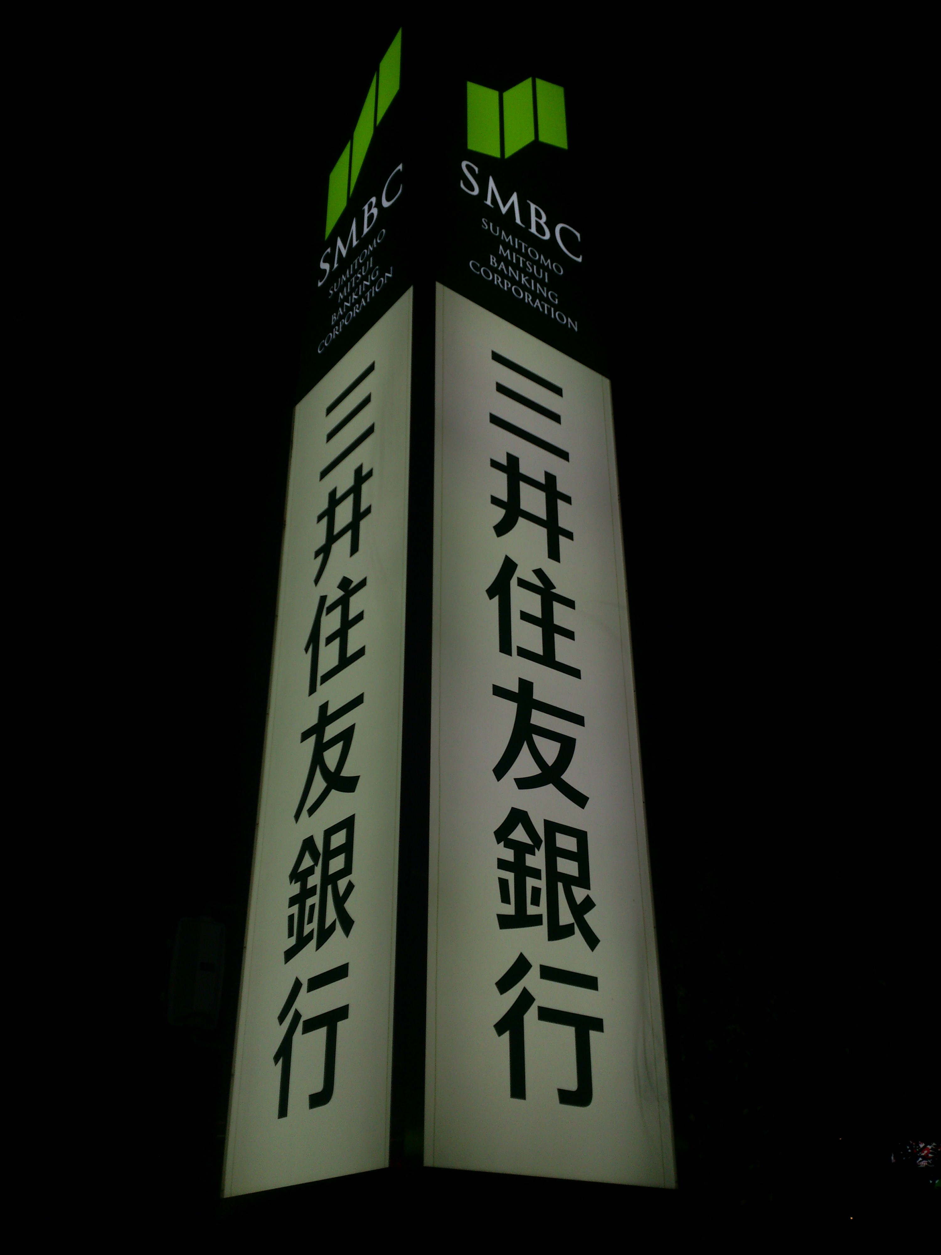 三井住友銀行 八尾支店 夜間の看板